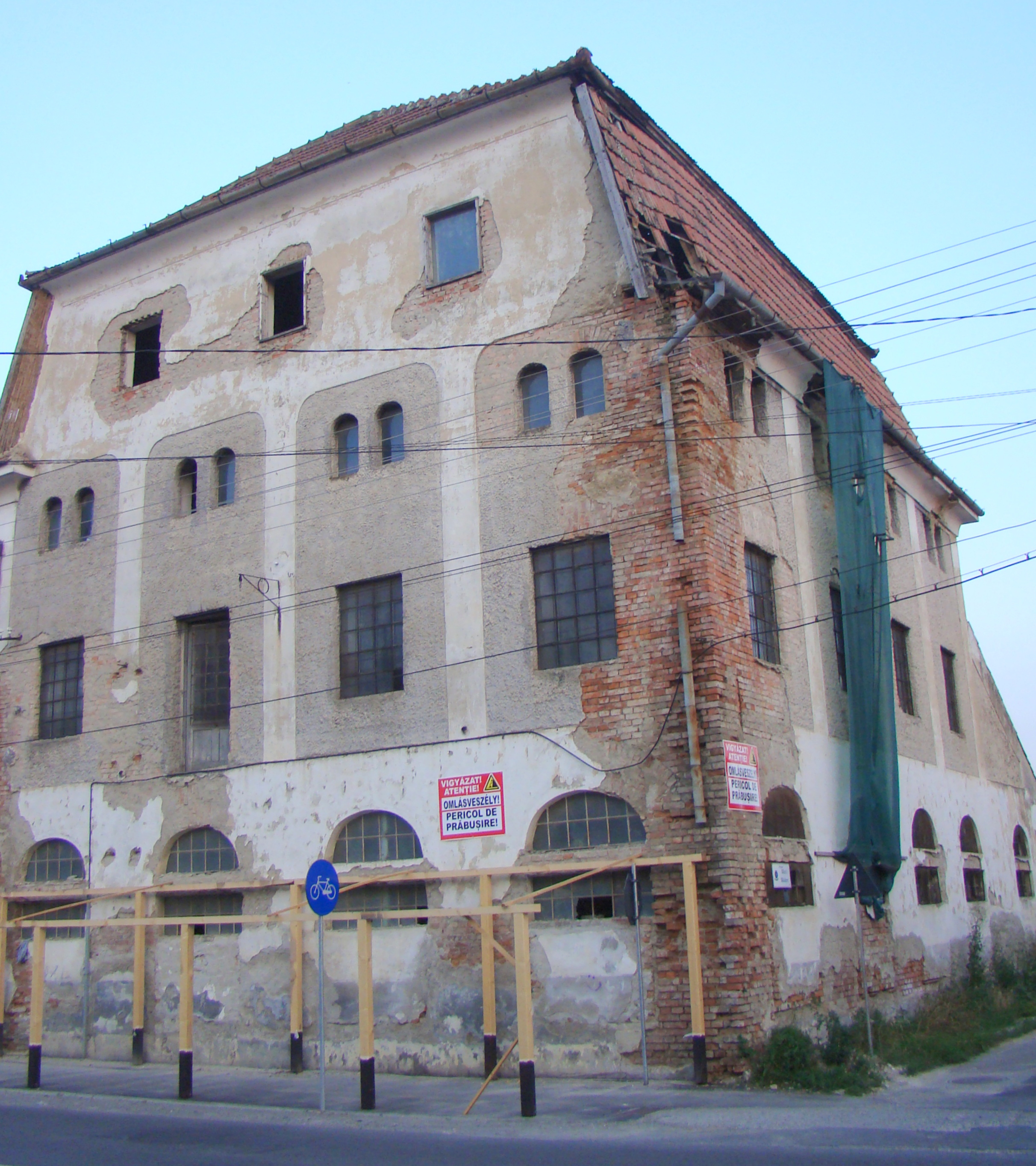 Prima moară cu aburi, oraș Cristuru Secuiesc, str. Timafalvi 24 sec. XX